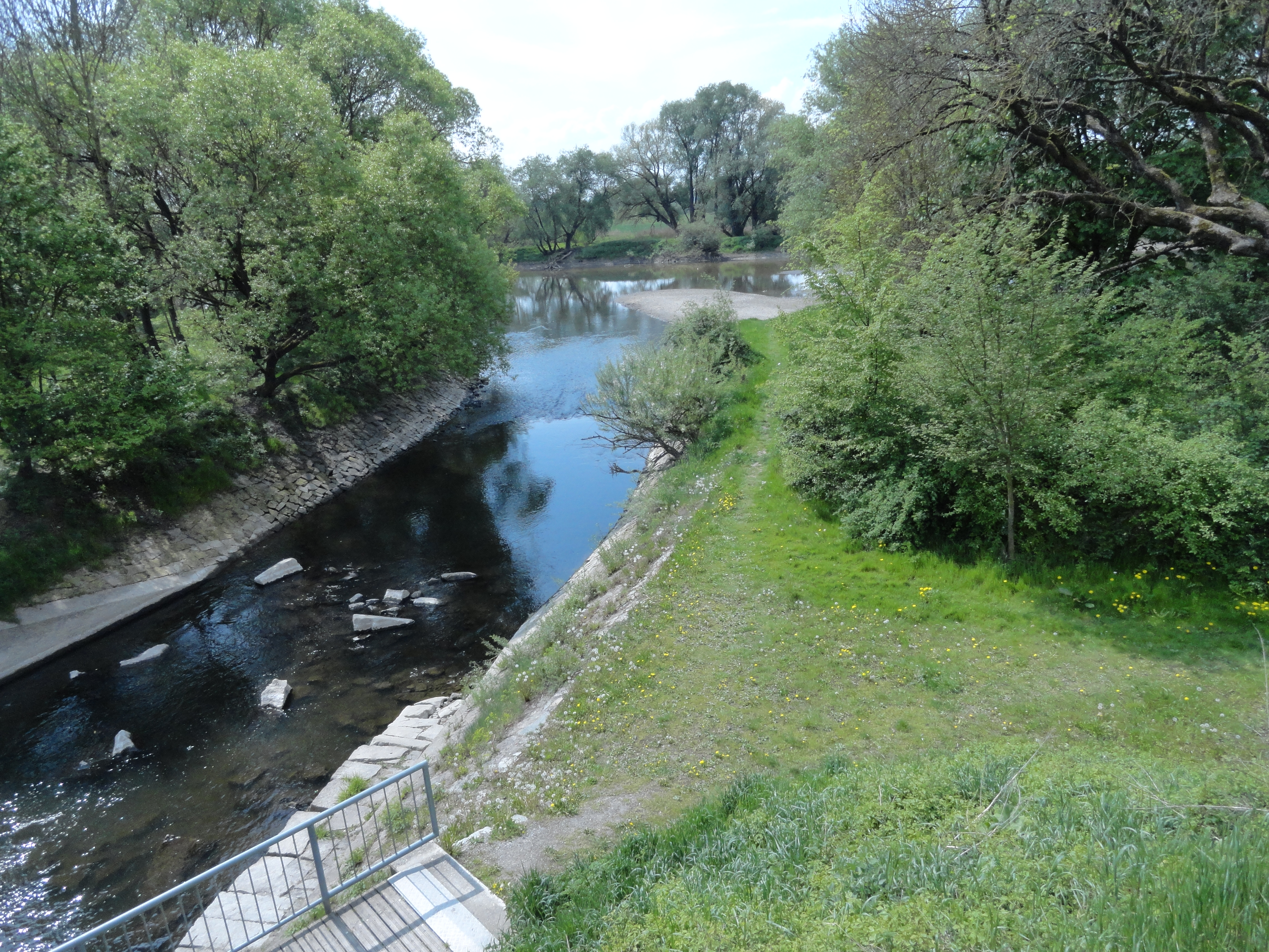 Mündung des Bogenbach in Bogen (Stadt)